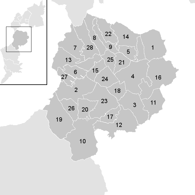 Leere Karte mit den Gemeinden im Österreichischen Bezirk Oberpullendorf